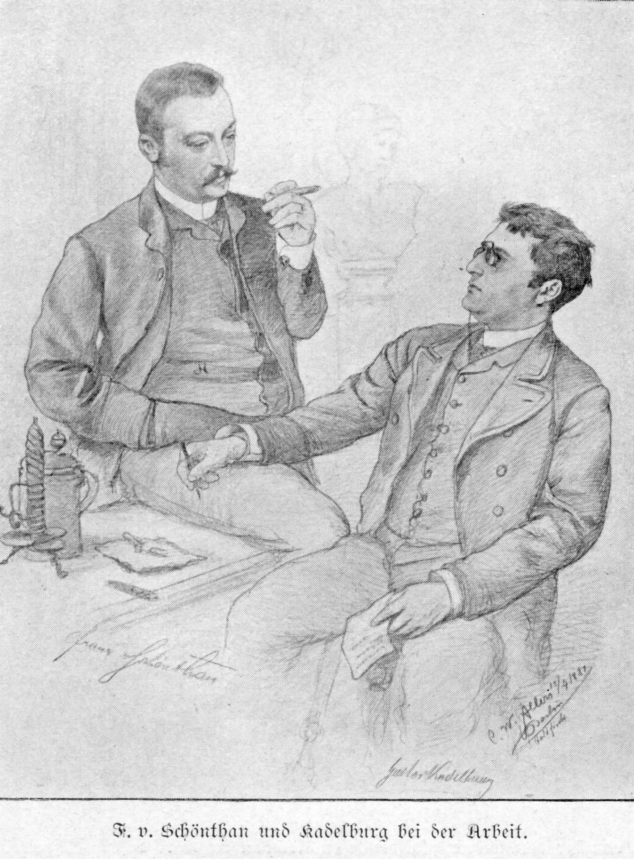 Bühnenschriftsteller Franz Schönthan und Schauspieler und Autor Gustav Kadelburg